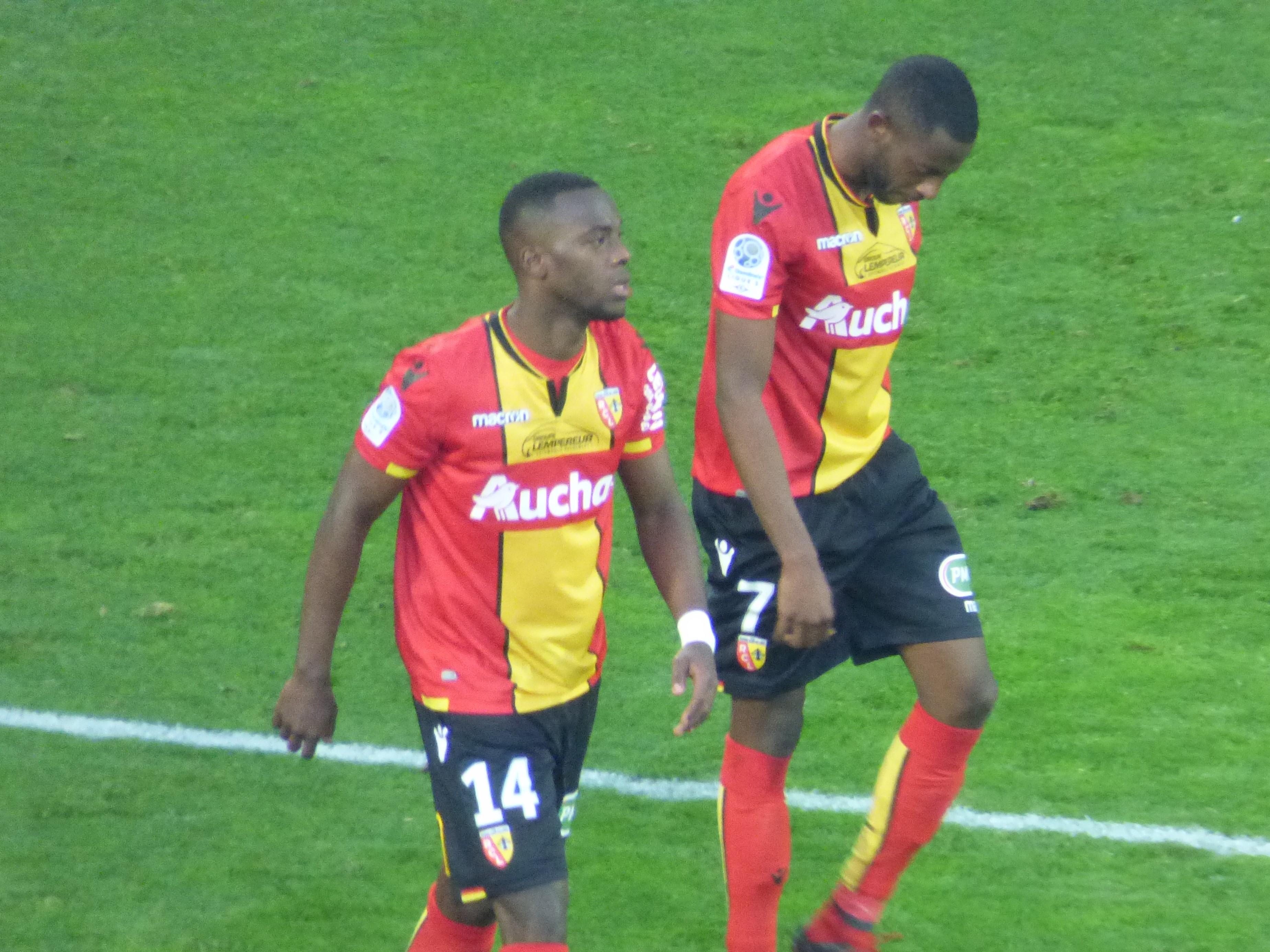 Yannick Gomis et El-Hadji Ba pendant le match RC Lens - AC Ajaccio, comptant pour la dix-neuvième journée du championnat de France de Ligue 2 2018-2019, le 22 décembre 2018, au Stade Bollaert-Delelis de Lens.